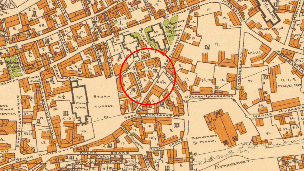 Kvarteret Novisen i Visby innerstad från Serbonis karta 1912